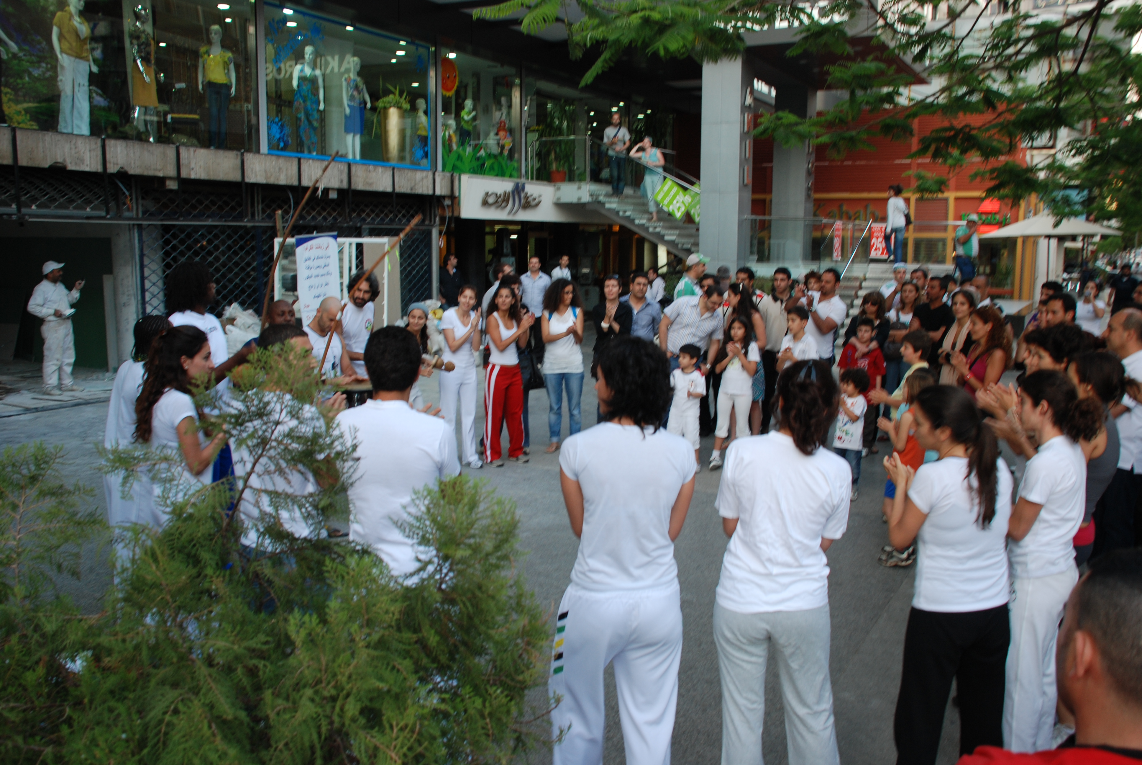 CapoeiraShowHamra